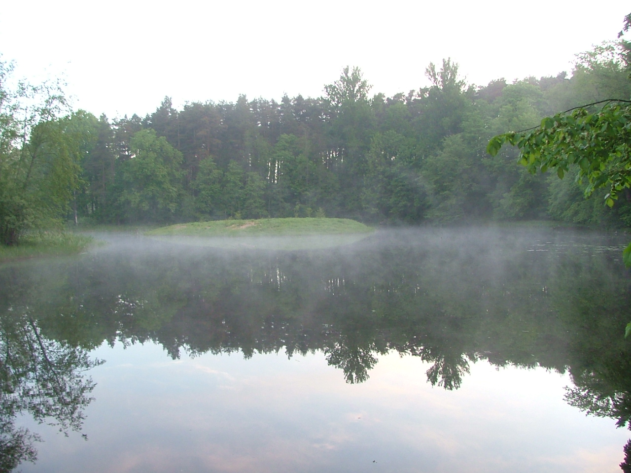 Varahommikul kella viie paiku.